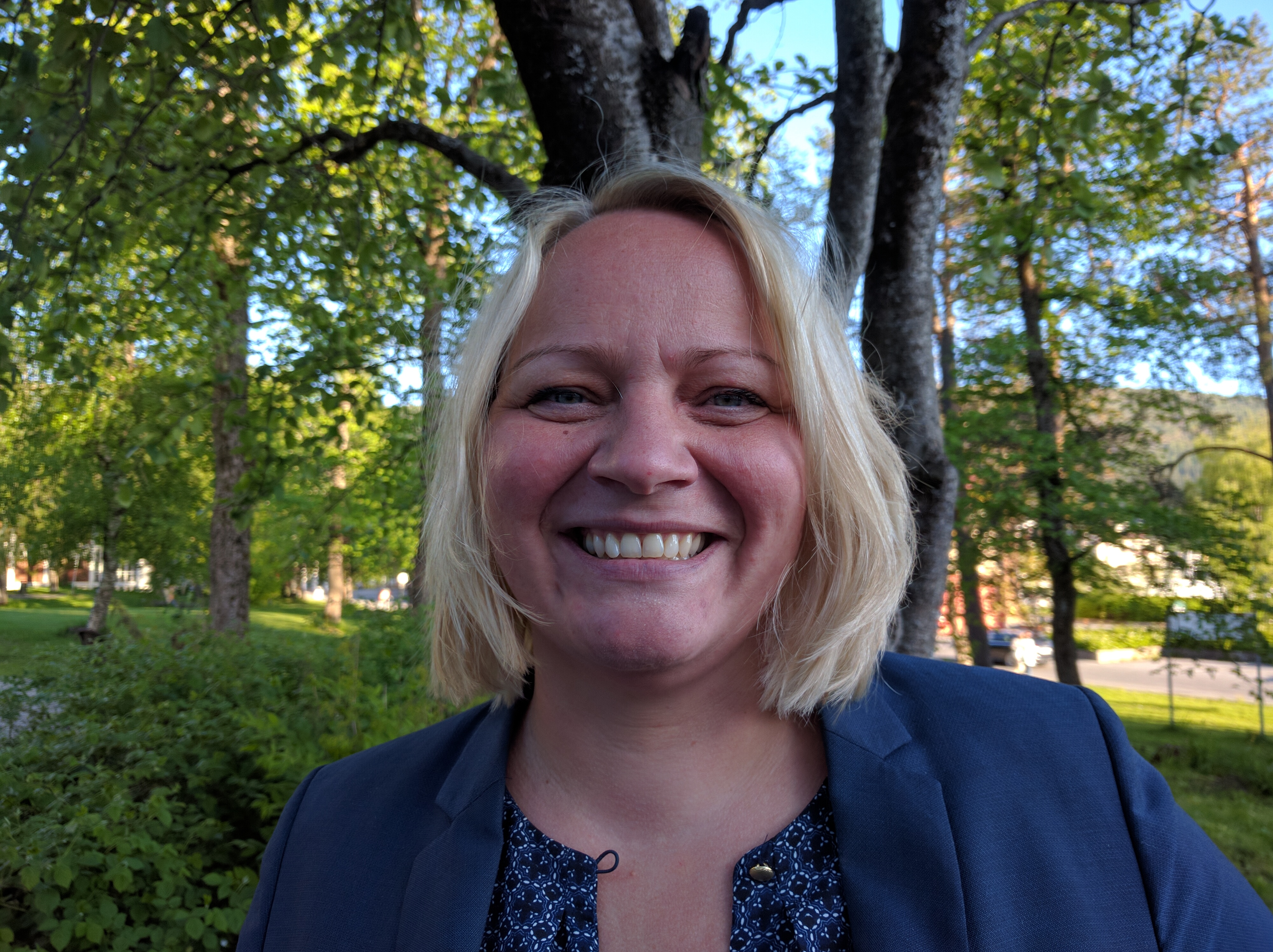 Mona Fagerås, norsk politiker